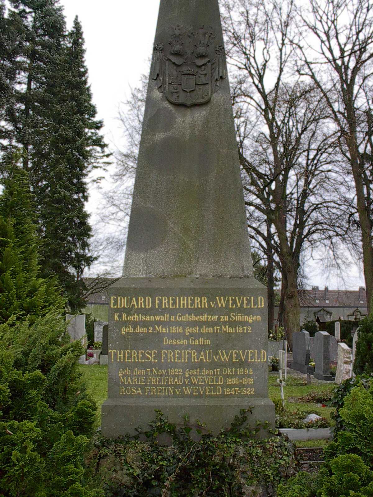 Das Monument am Grabe von Freiherr Edduard von Weveld